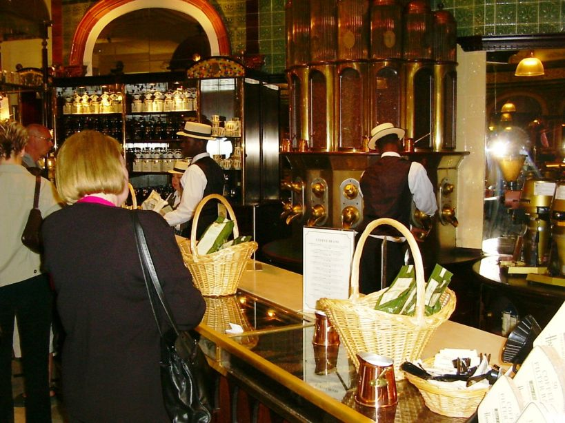 Harrods te Londen - eigen foto